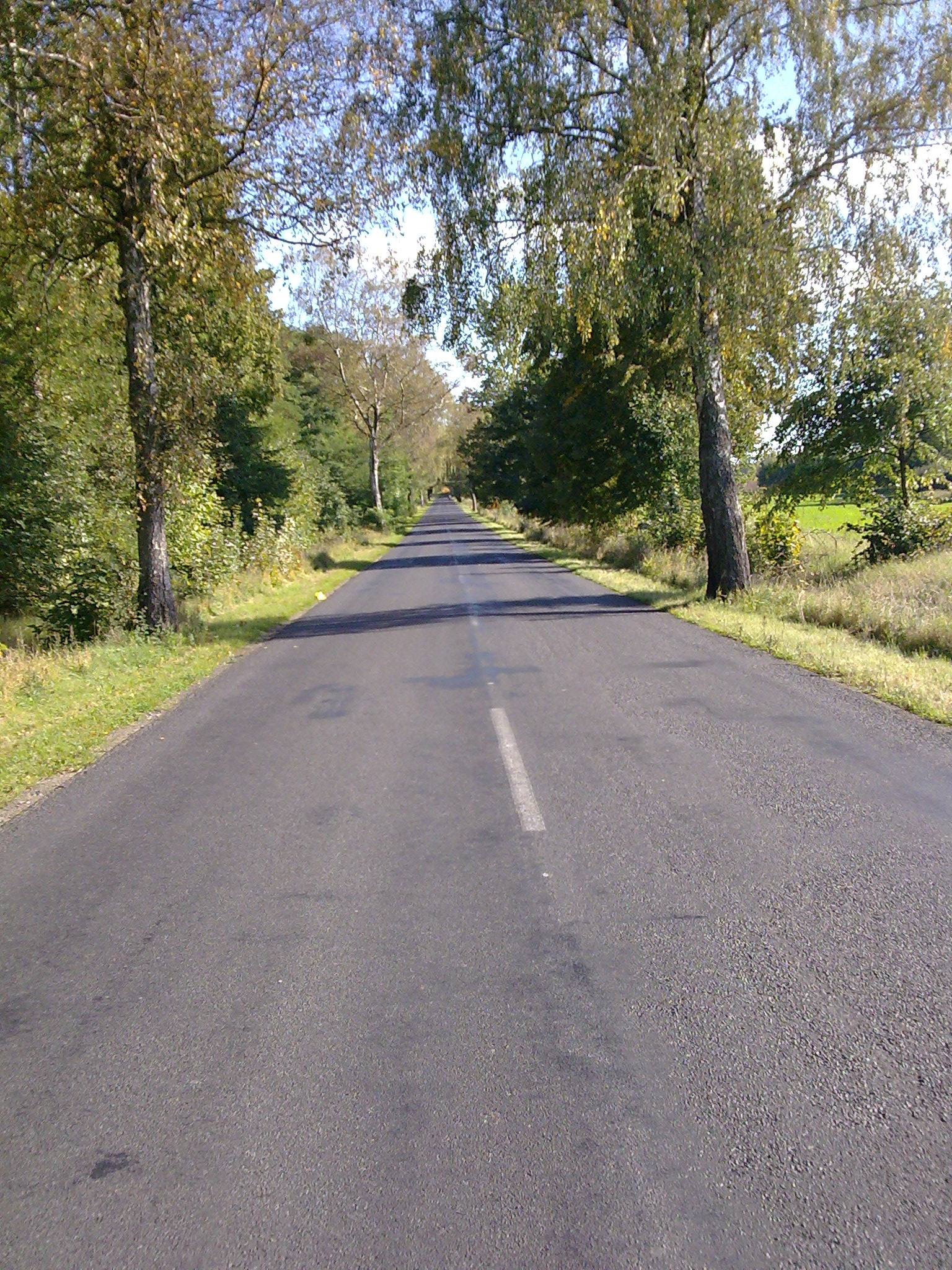 na trasie Człuchów - Czarne (kier Człuchów)